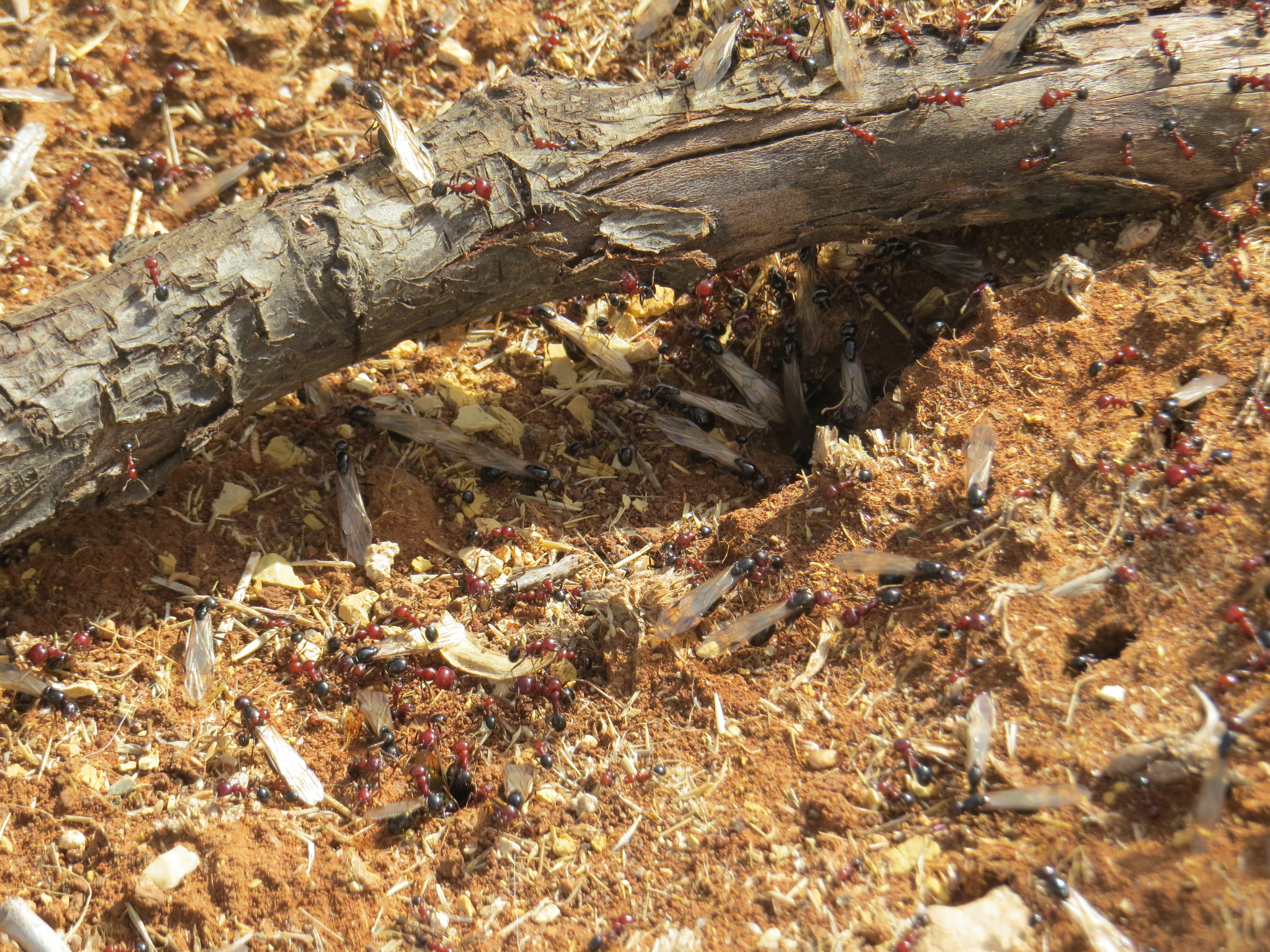 נמלים זכרים עוזבים את הקן.